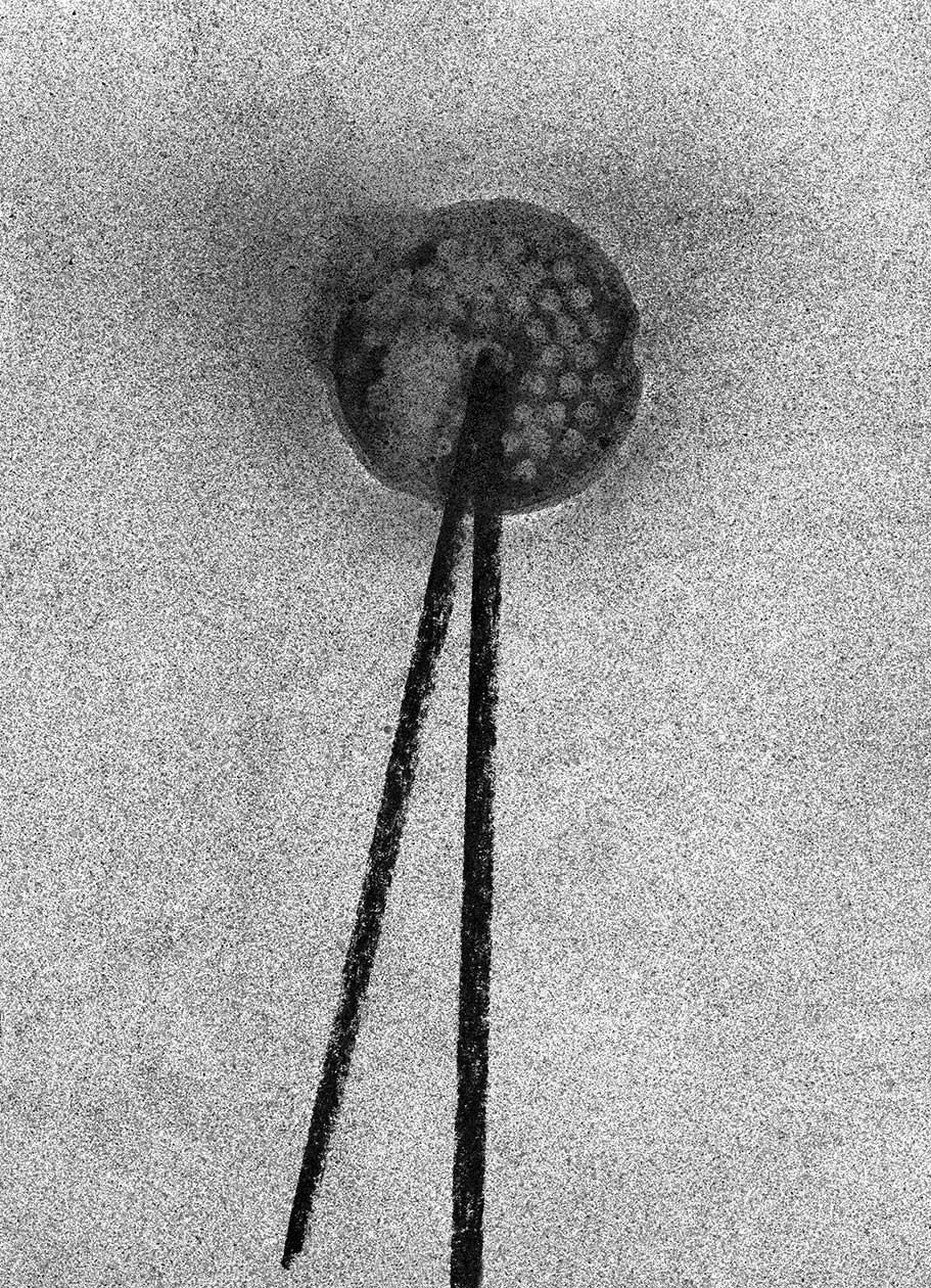 מגדלור , 2013 - מתוך עבודות חדשות